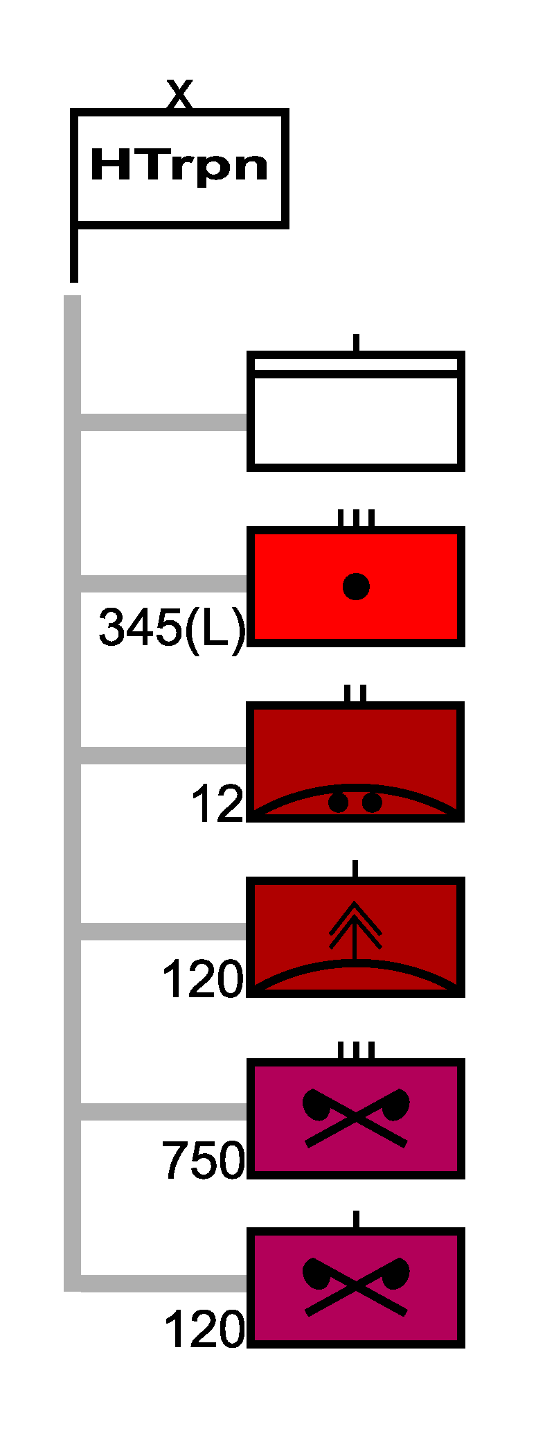 Gliederung Herestruppenkommando im deutschen Heeres.